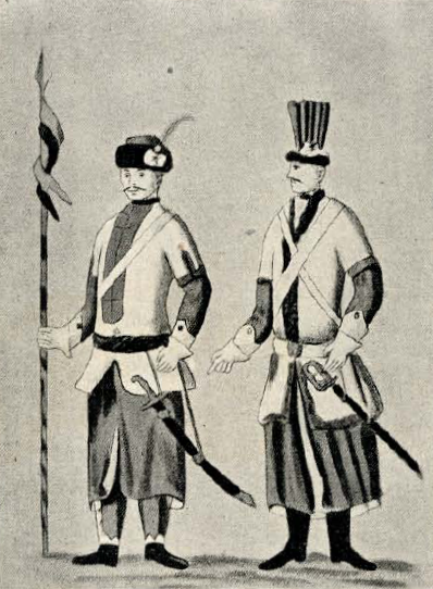 Ułan i pocztowy pułku ułanów nadwornych płk Mustafy Baranowskiego - sztych z 1781 r